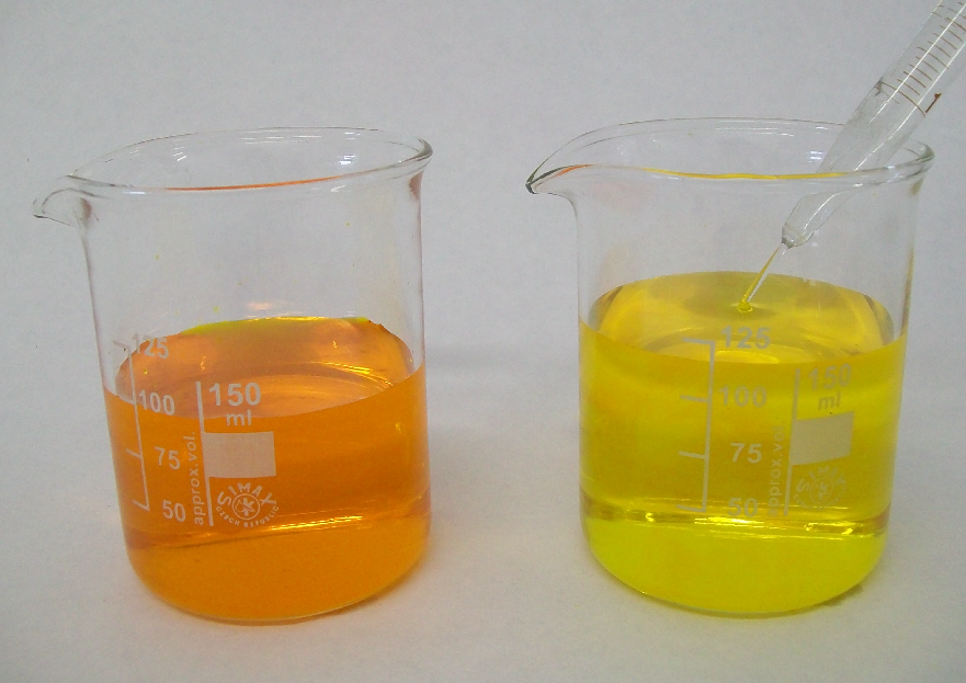 Evenwicht tussen dichromaat en chromaat. Door toevoegen van NaOH verschuift het evenwicht naar rechts (naar chromaat) en wordt de oplossing geler.